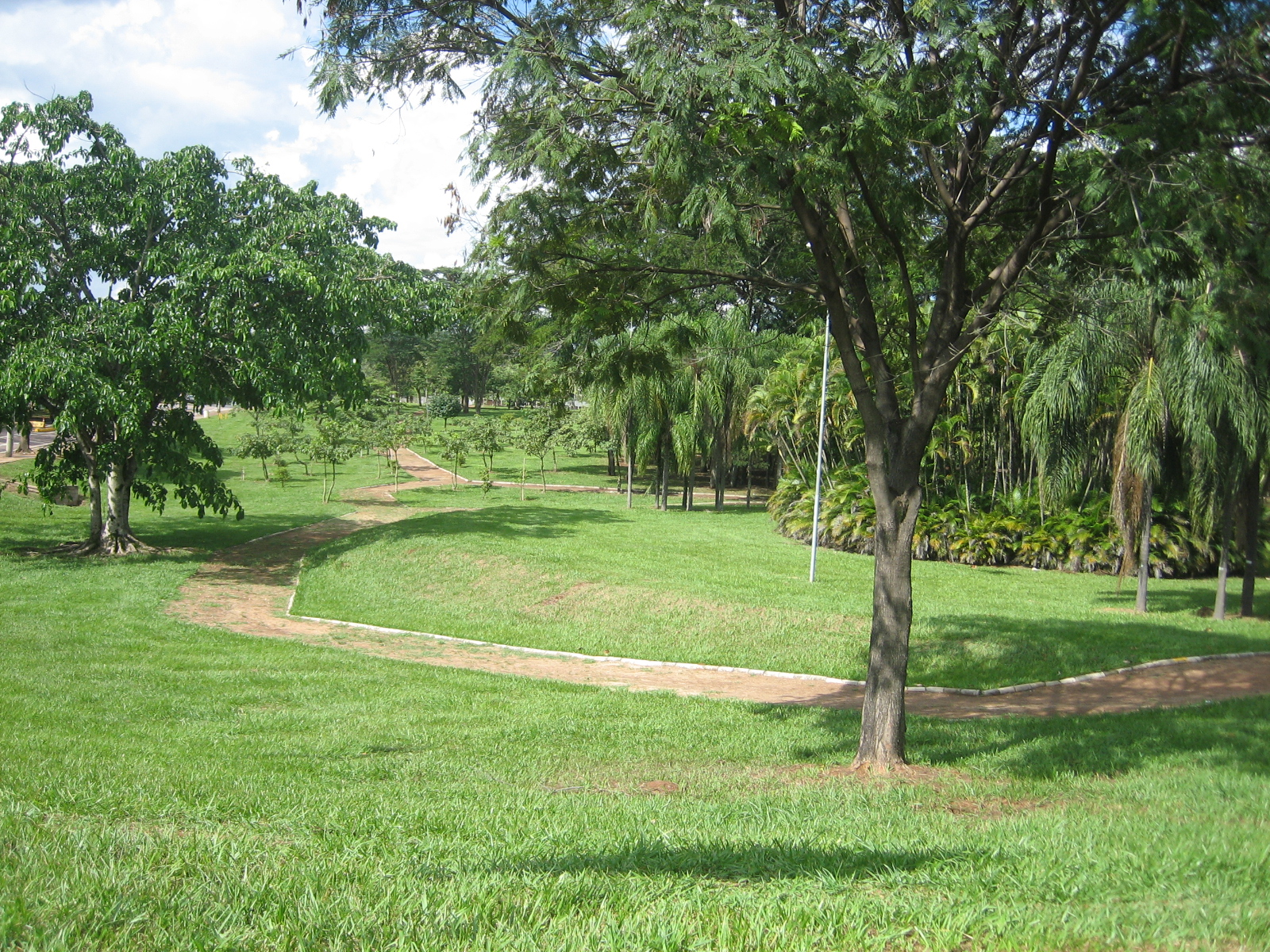 Praça da Paz na Unicamp.